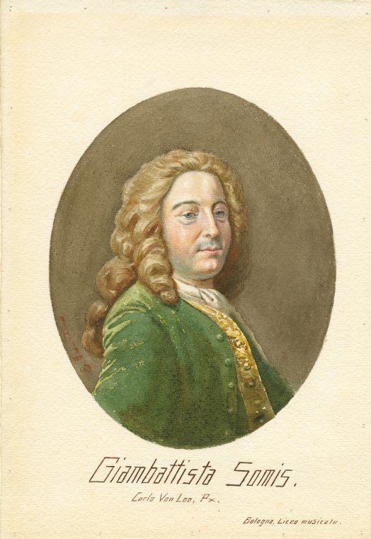 Depicted person: Giovanni Battista Somis